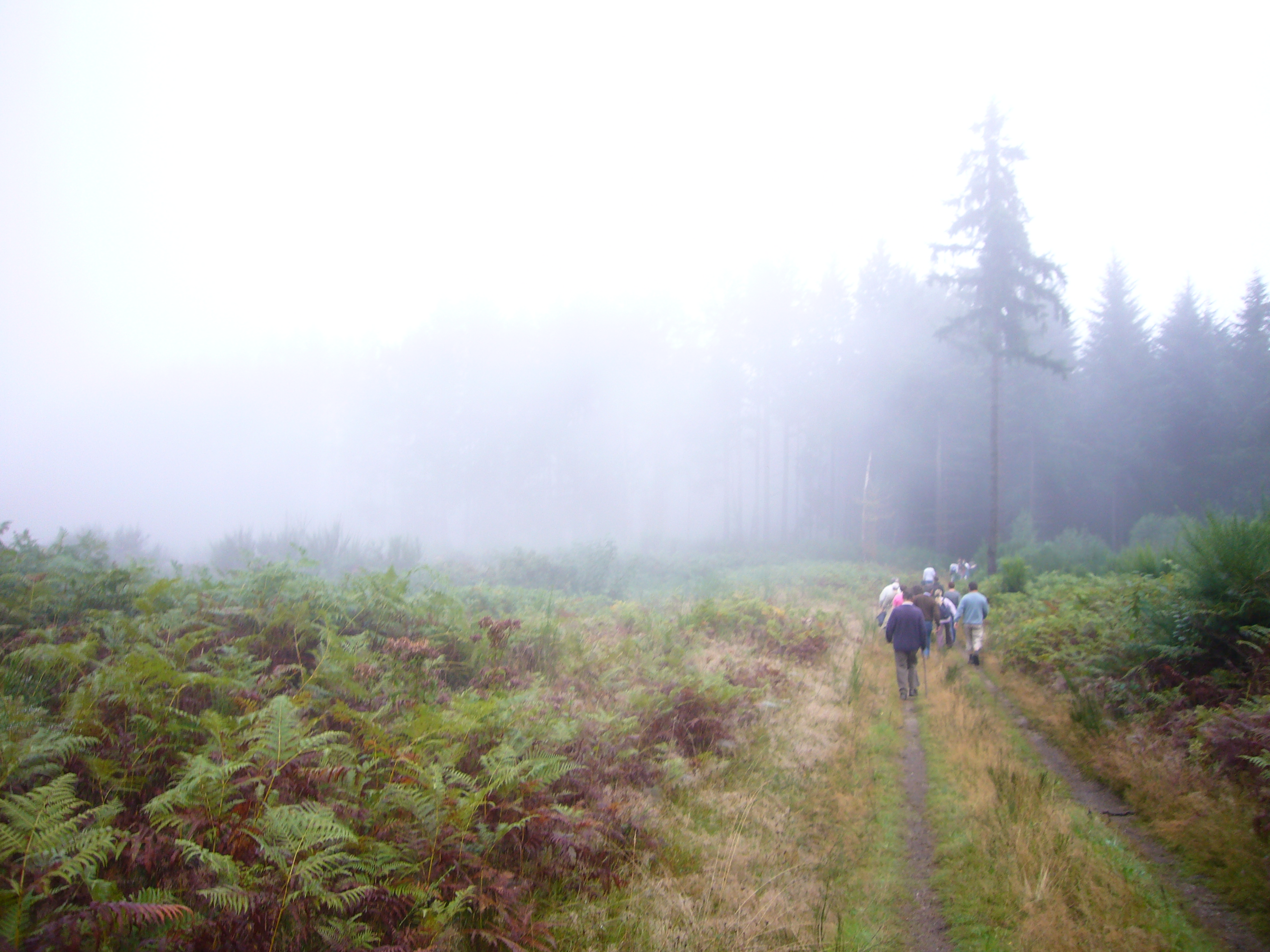 Randonnée sur le plateau de Millevaches, près de Nedde, Haute-Vienne, France